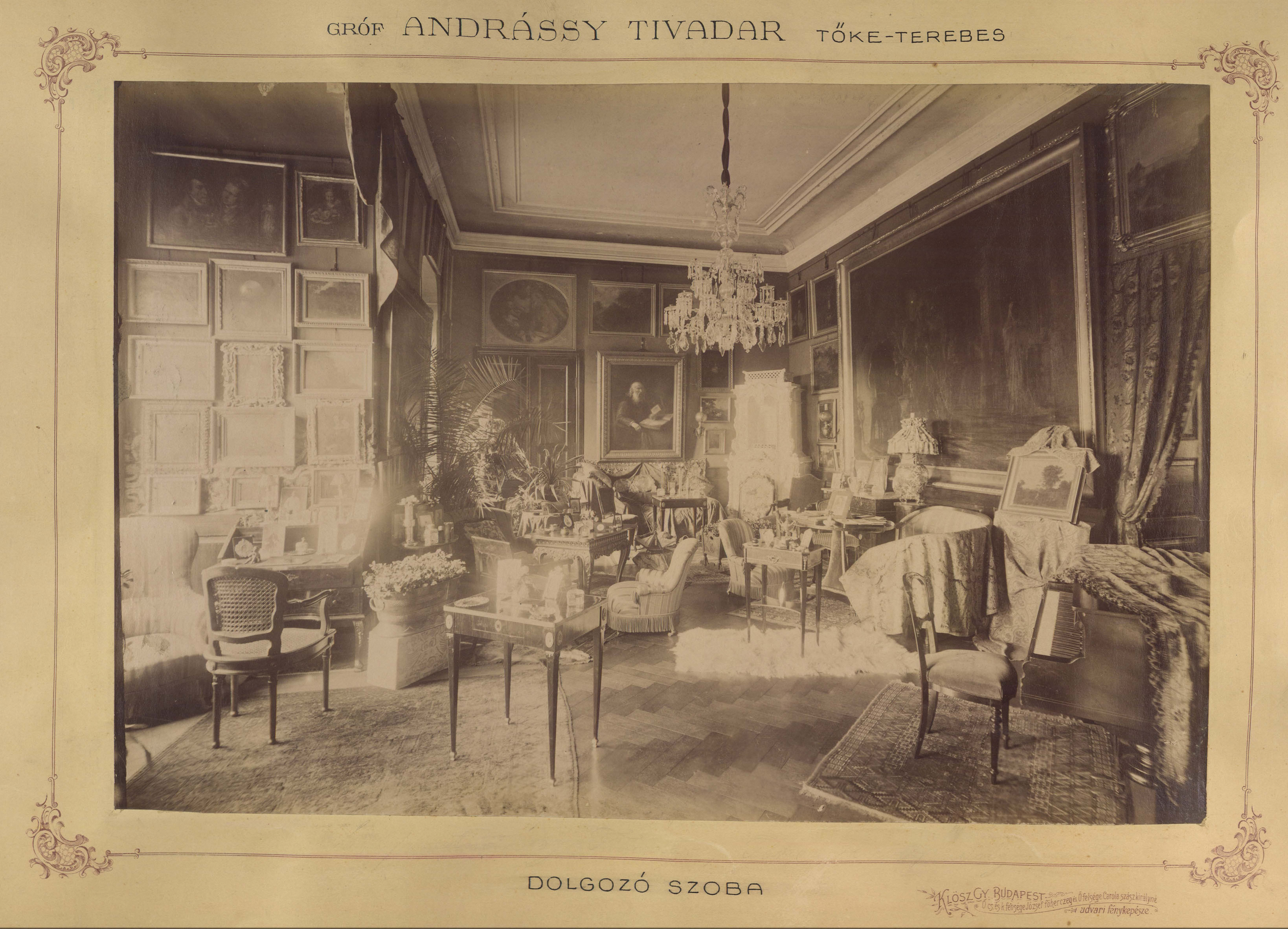 Andrássy Tivadar gróf barokk kastélyának dolgozószobája. A felvétel 1895-1899 között készült. A kép forrását kérjük így adja meg: Fortepan / Budapest Főváros Levéltára. Levéltári jelzet: HU.BFL.XV.19.d.1.12.191 Location: Hungary, Trebišov Tags: interior, chandelier, painting, tile stove Title: Andrássy Tivadar gróf barokk kastélyának dolgozószobája. A felvétel 1895-1899 között készült. A kép forrását kérjük így adja meg: Fortepan / Budapest Főváros Levéltára. Levéltári jelzet: HU.BFL.XV.19.d.1.12.191